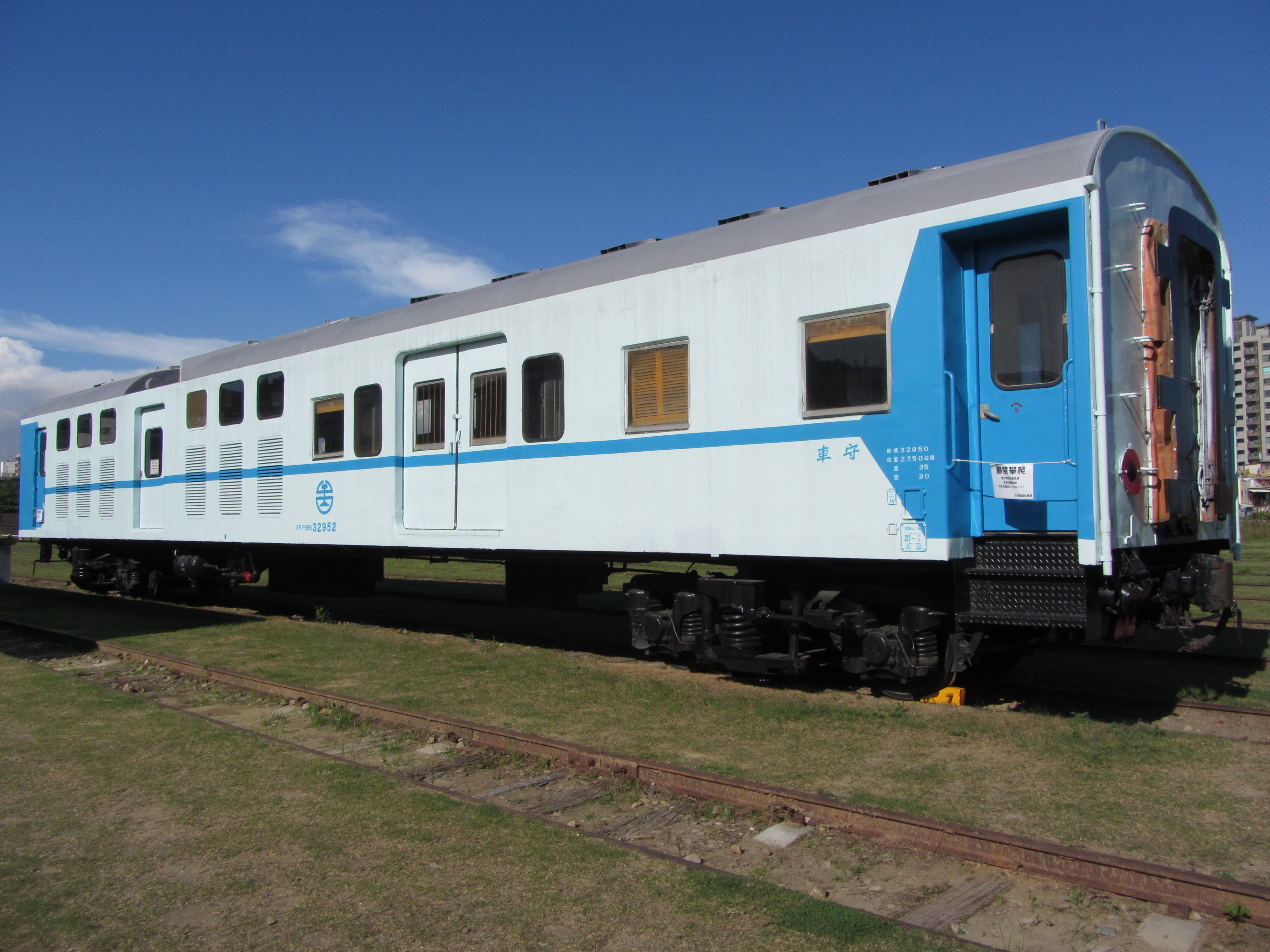 恢復成台鐵西部幹線鐵路電氣化以前塗裝的45PBK32952電源行李車